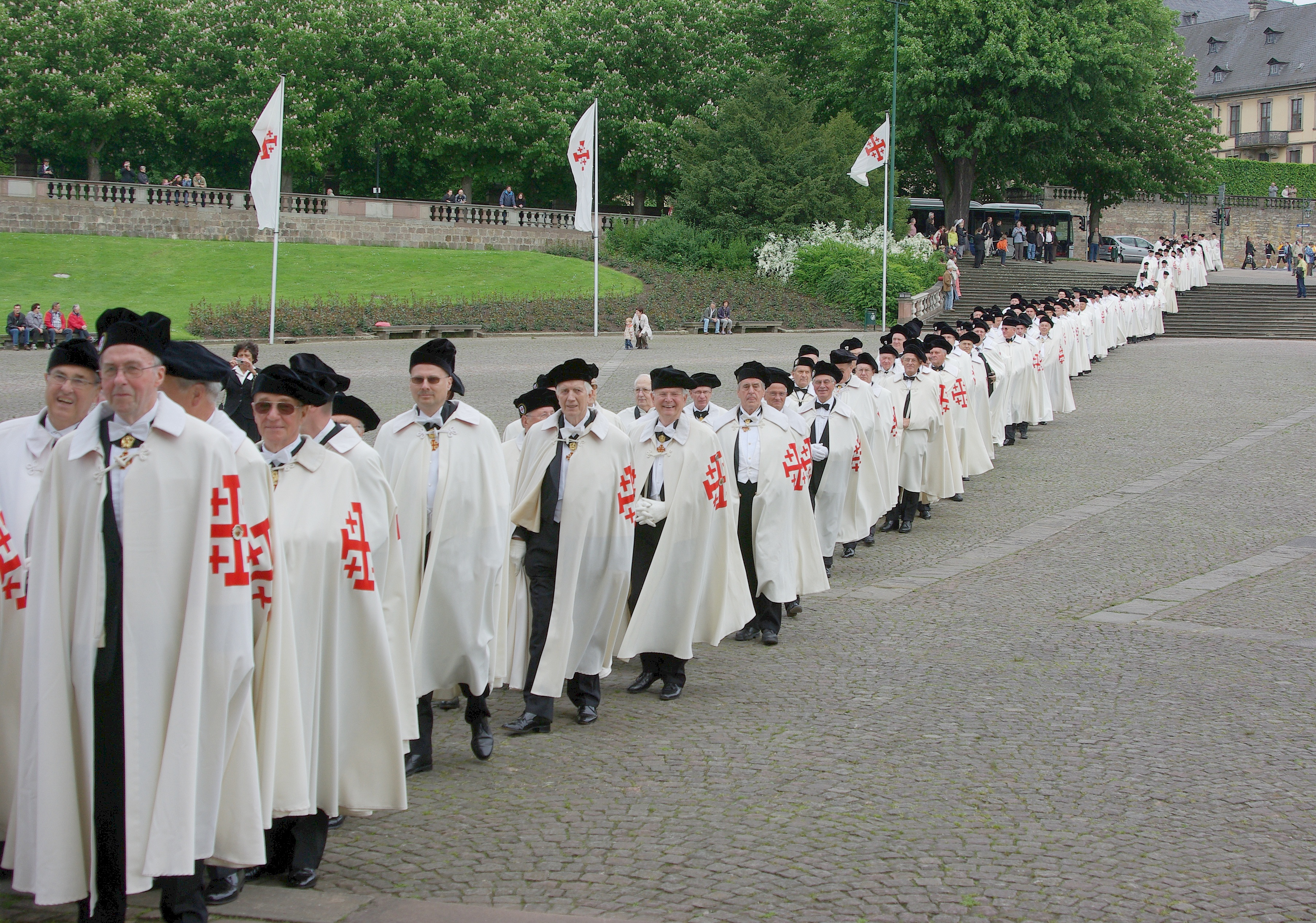 Einzug zur Investitur der Deutschen Statthalterei des Ritterordens am 16.5.2009 in den Hohen Dom zu Fulda (Germany)